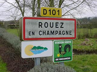 Image personnelle de Rouez-en-Champagne, Sarthe ( 72 ) par Pretorien0